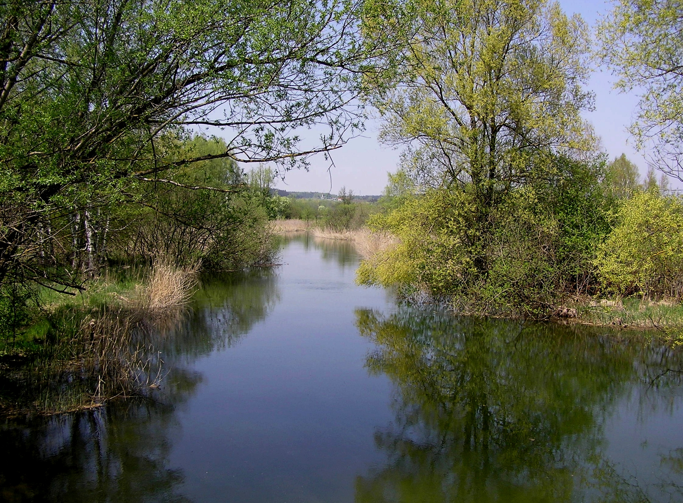 Die Würm an ihrem Oberlauf durch das Naturschutzgebiet Leutstettener Moos.